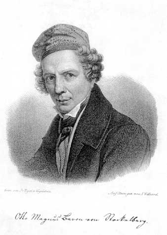 Otto Magnus von Stackelberg (1786–1837)